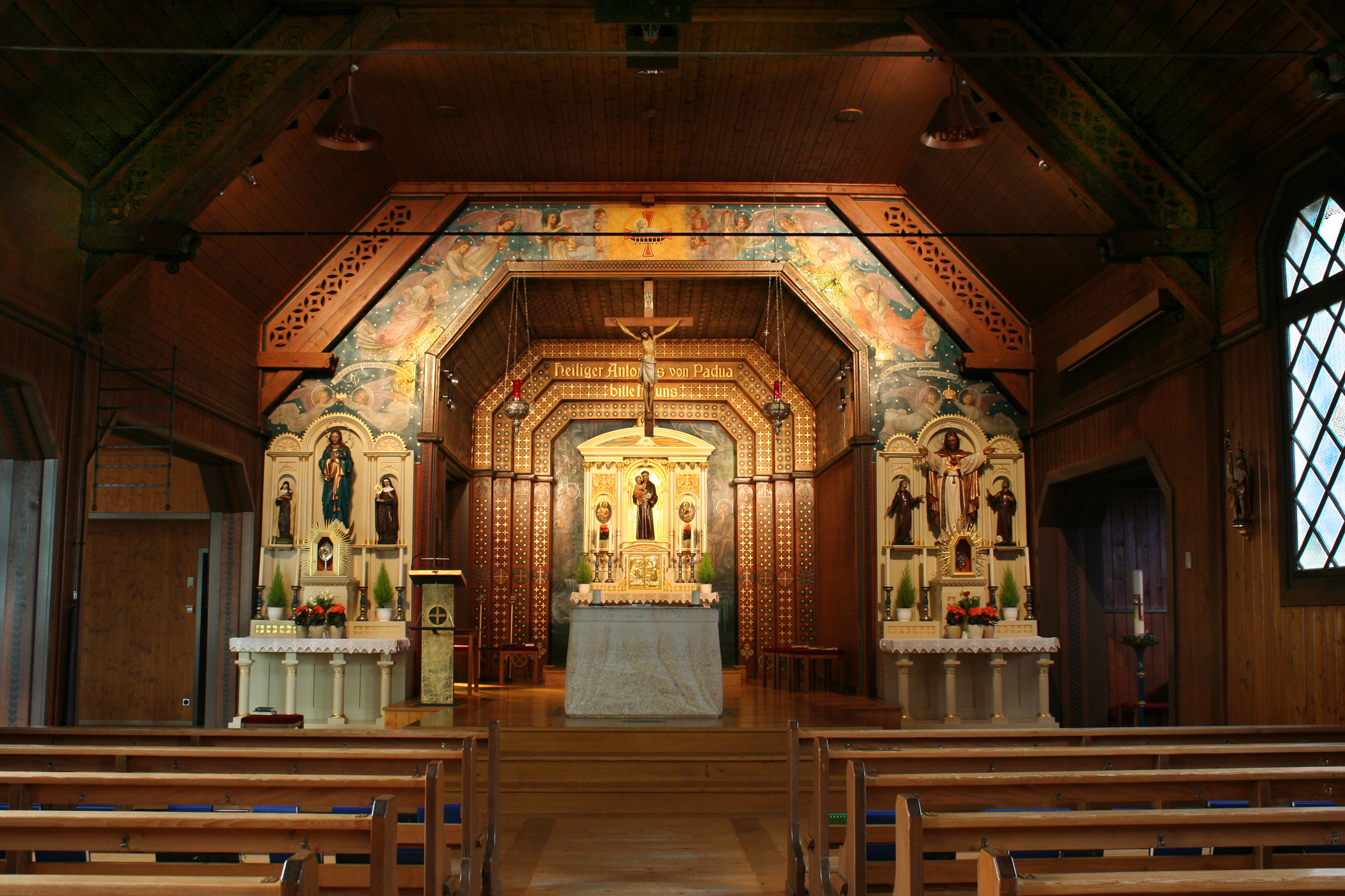 Römisch-katholische Pfarrkirche St. Antonius Egg, Altarraum